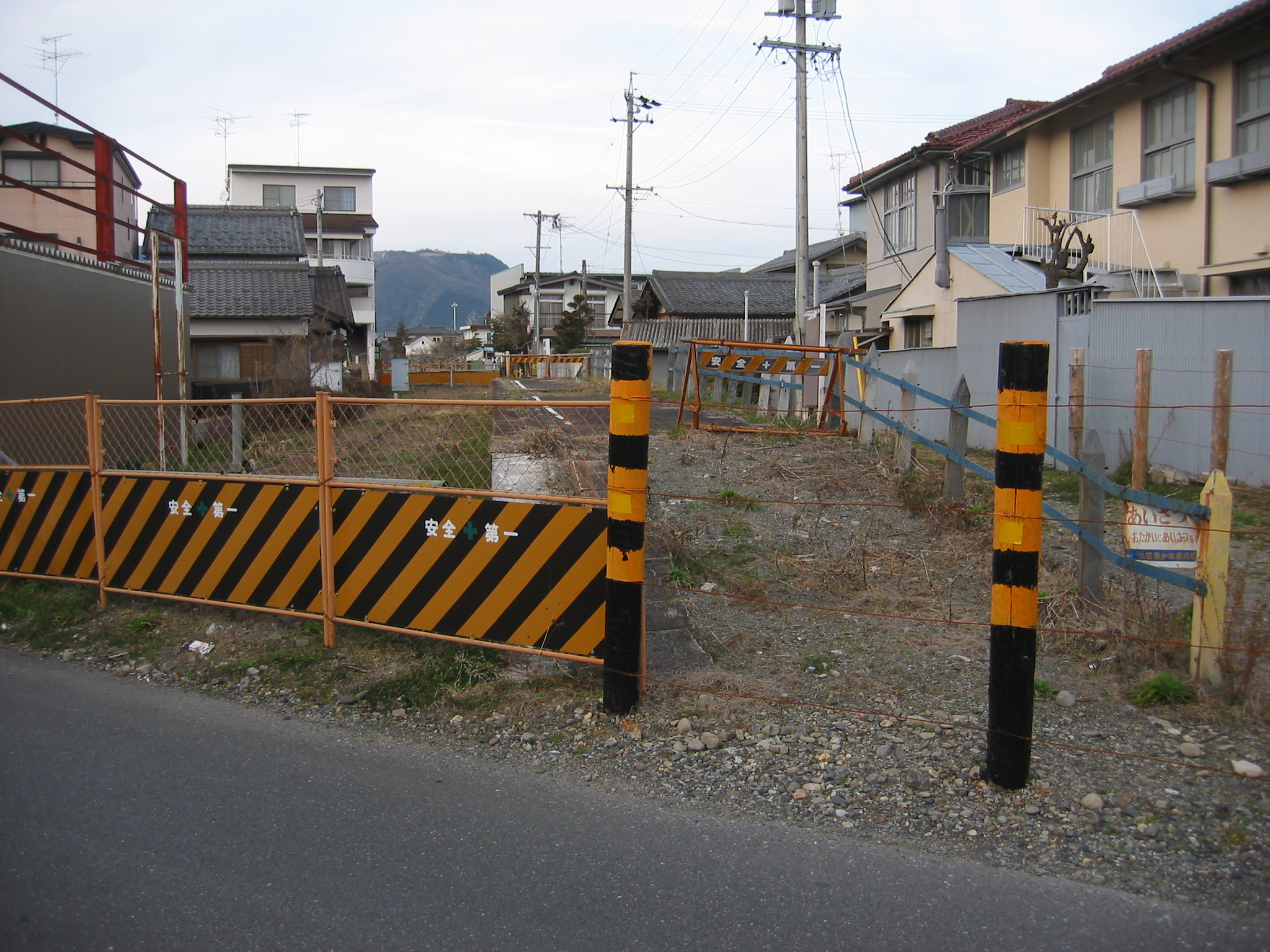 黒野北口駅跡。今はどうなっているのでしょう…？